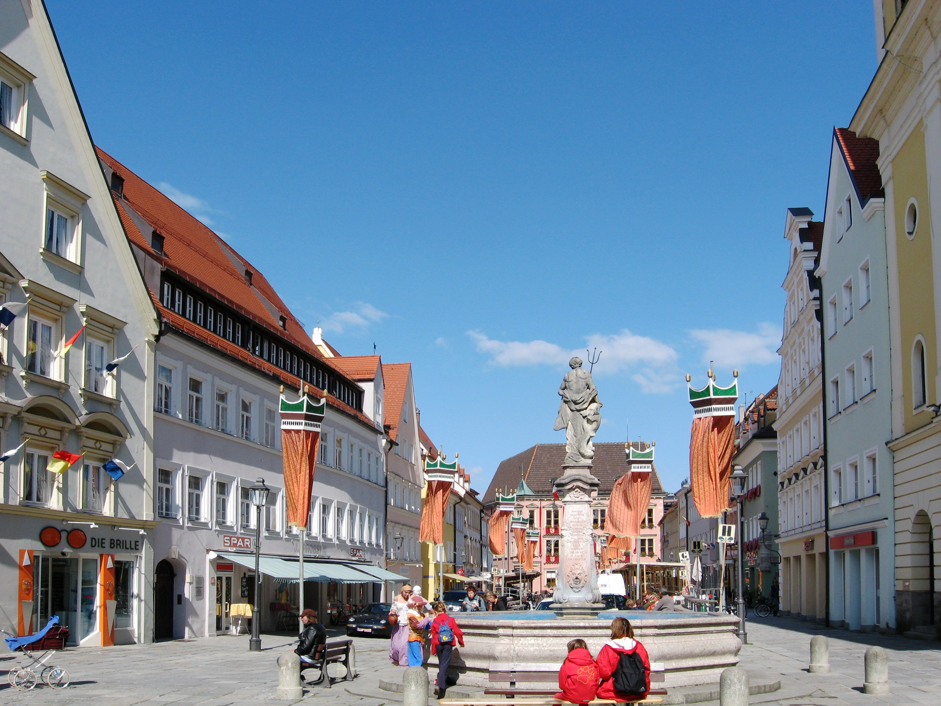 Innenstadt Kaufbeuren, Kaiser-Max-Straße, Neptunbrunnen, Blickrichtung Rathaus